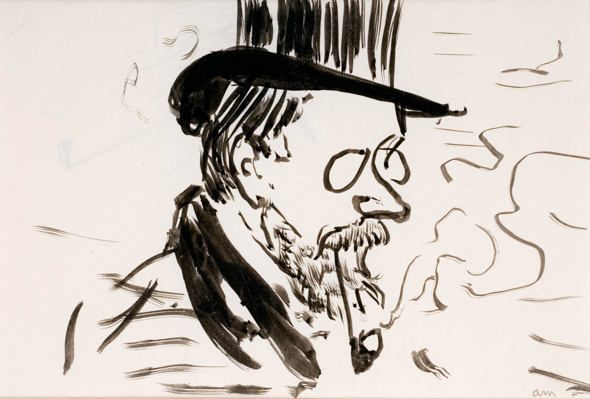 Matisse en haut-de-forme, dessin à l'encre de Chine sur papier vélin, 18.5 x 27.5 cm (Collection Olivier Senn, donation Hélène Senn-Foulds 2004, n° inv. 2004-3-195).